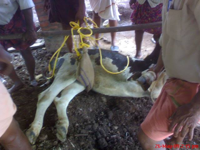 അല്പം പോലും ദുർഗന്ധമില്ലാതെ ,ചീയൽ നടക്കാതെ ദ്രവിച്ച് കമ്പോസ്റ്റായി മാറുവാൻ 90 ദിവസങ്ങൾ എടുത്തു.